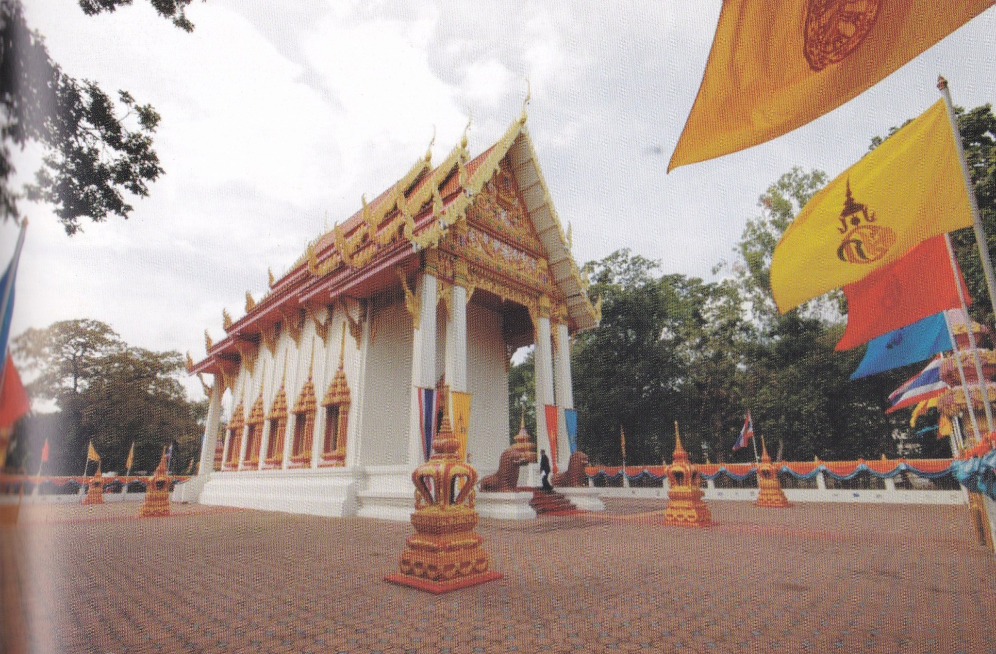 พระอุโบสถ